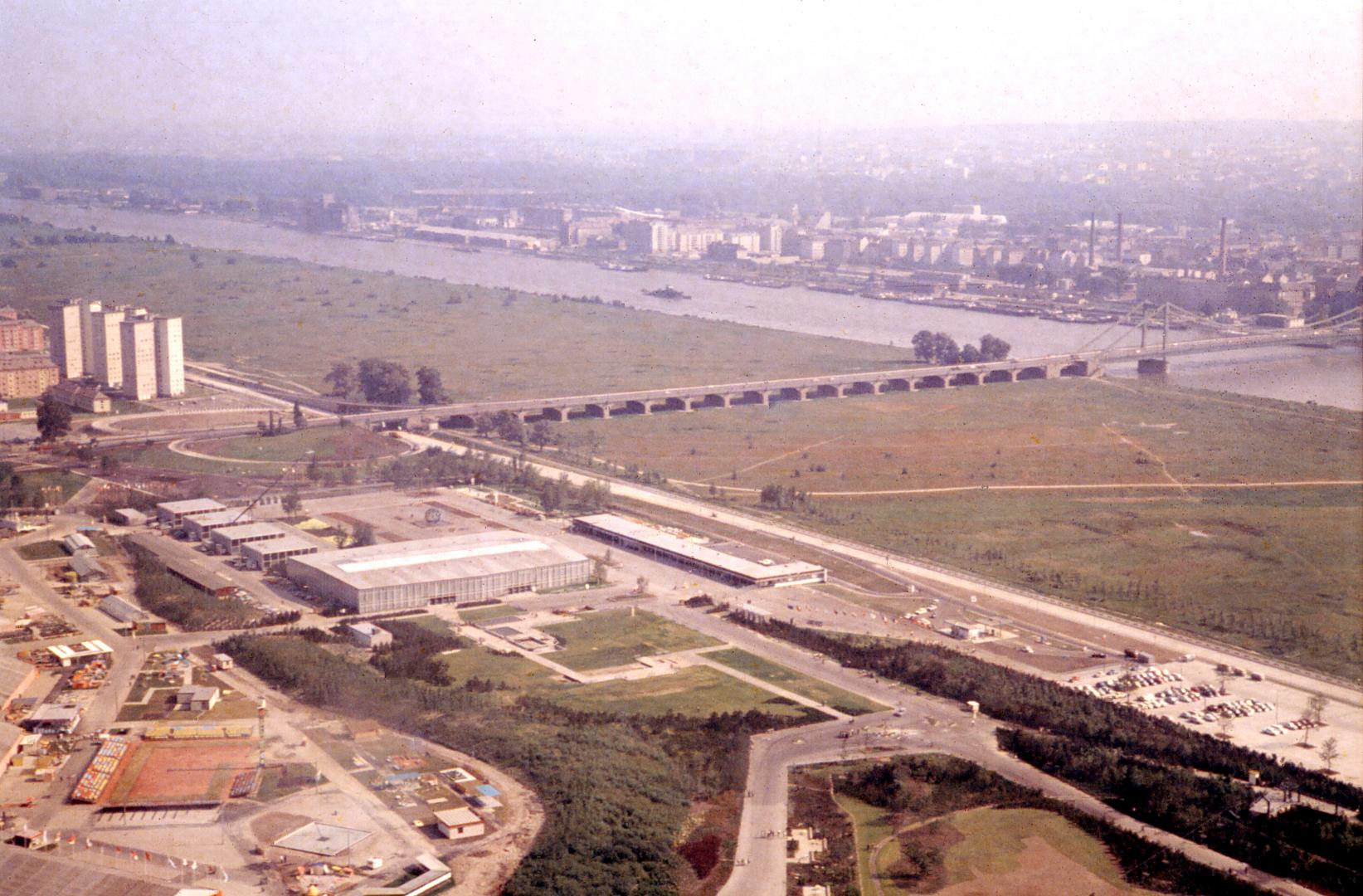 Donau in Wien mit der alten "Zweiten Reichsbrücke", Überschwemmungsgebiet, WIG Gelände